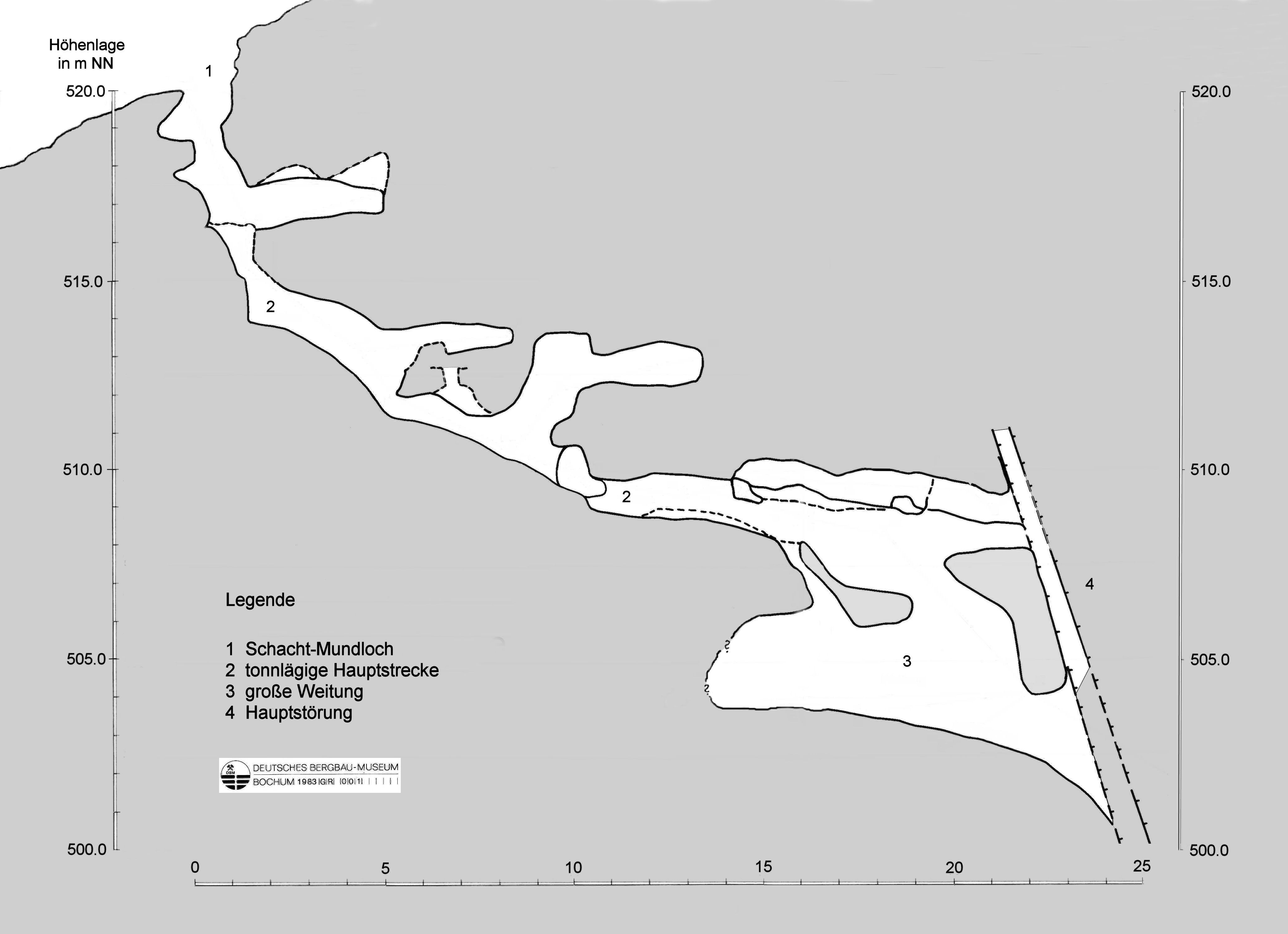 Goldbergwerk Klisidi, Grube TG 80 E 1, Schnitt durch Tonnlage und Weitung